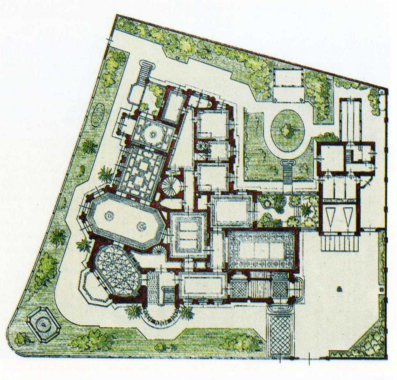 Villa Beuststraße 1, Dresden, Grundriss